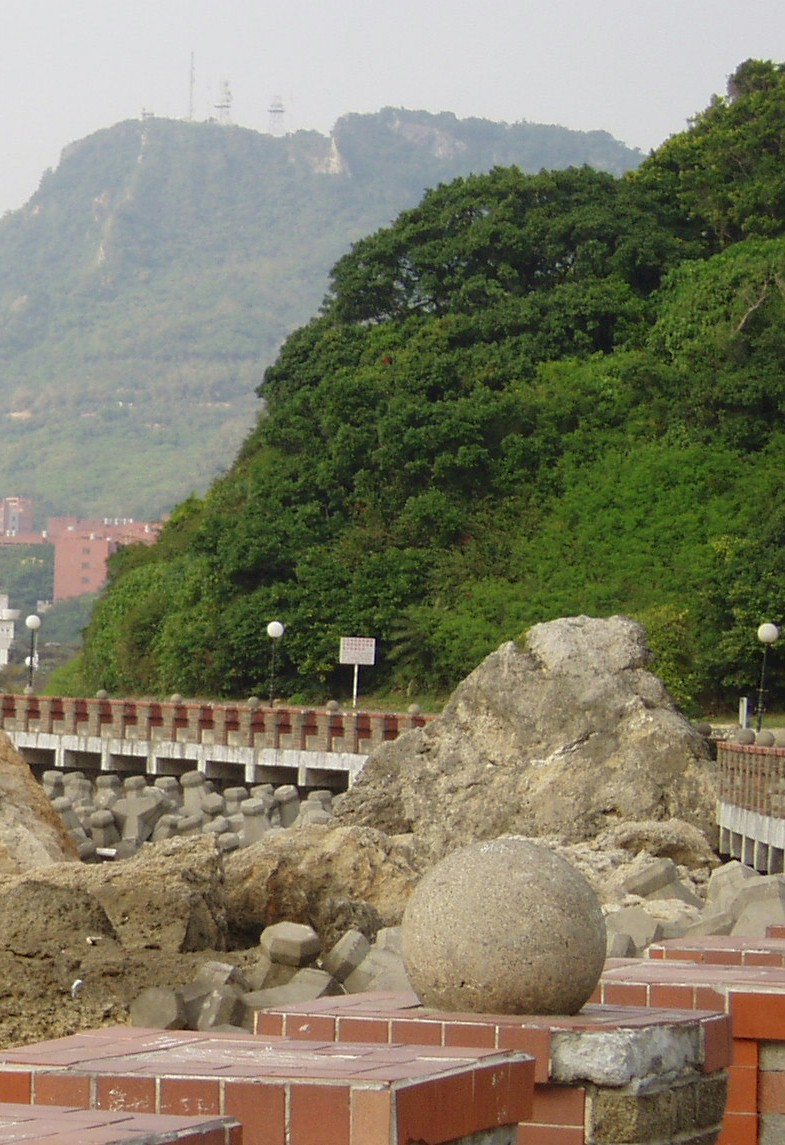 中山大學內所見的柴山